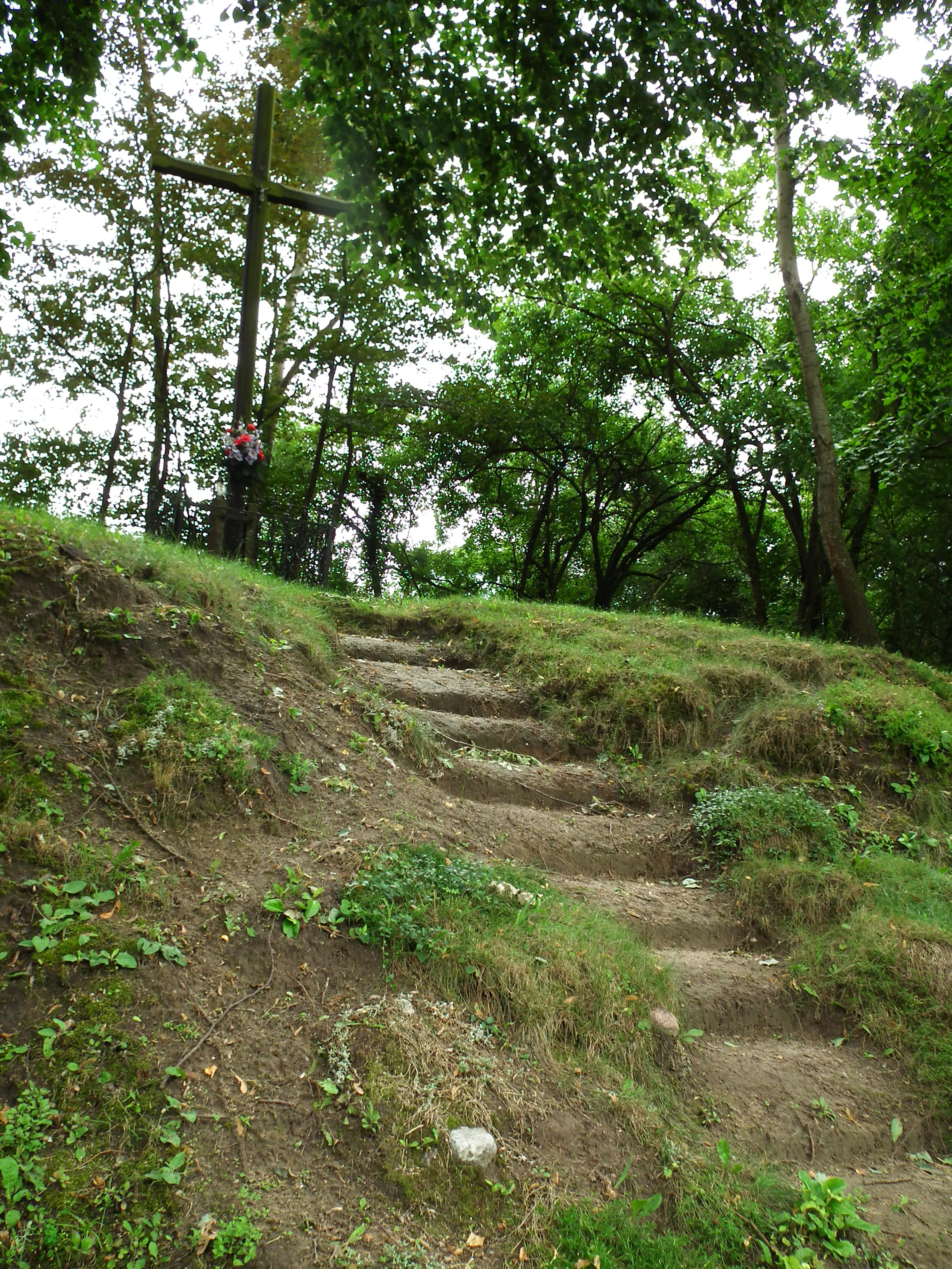 Wieś Nienawiszcz. Krzyż upamiętnia zabójstwo młodego Polaka przez owładniętego ideologią hitlerowską Kurta Henke w dniu 8 września 1939r.